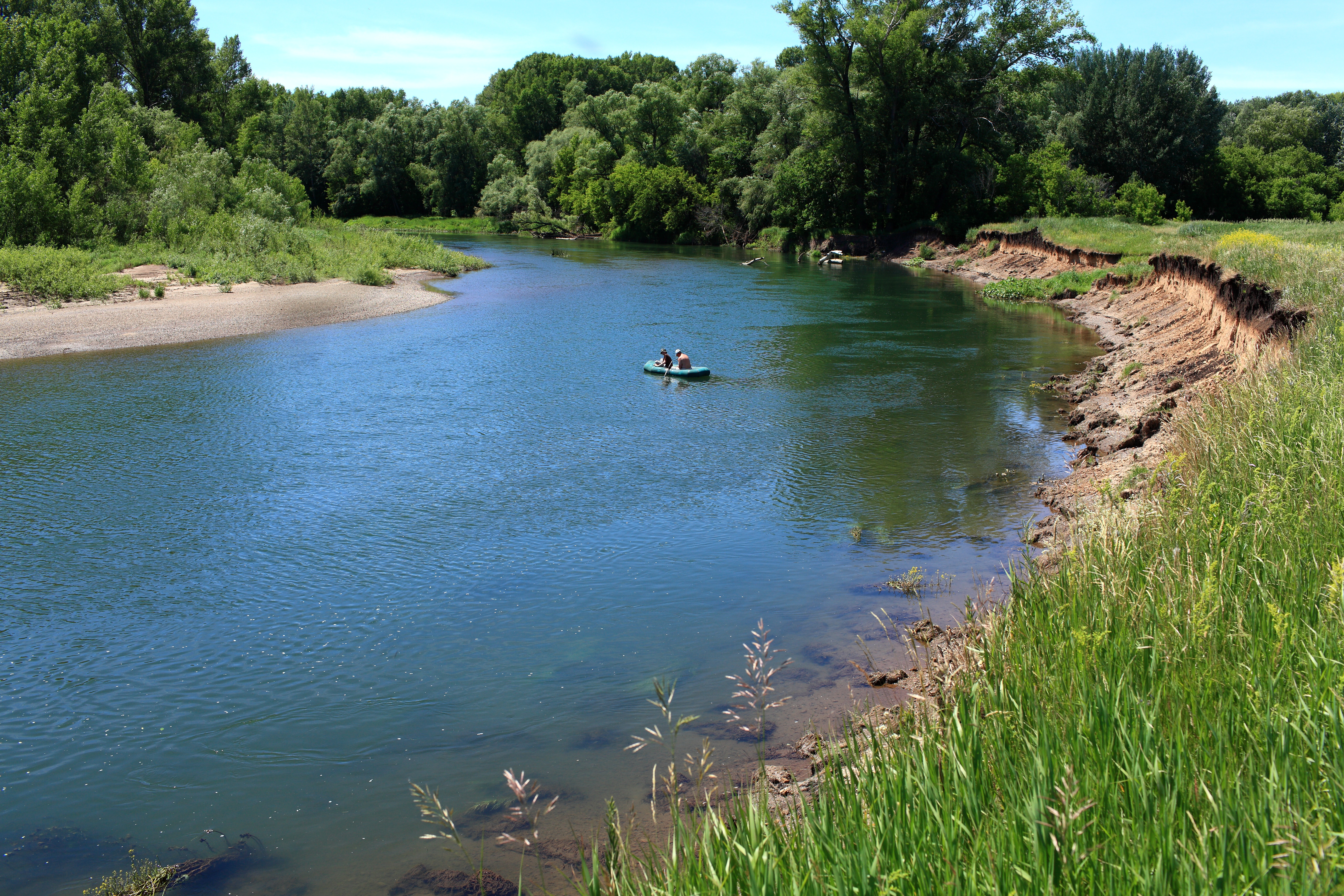 Река Большой Ик в западном направлении